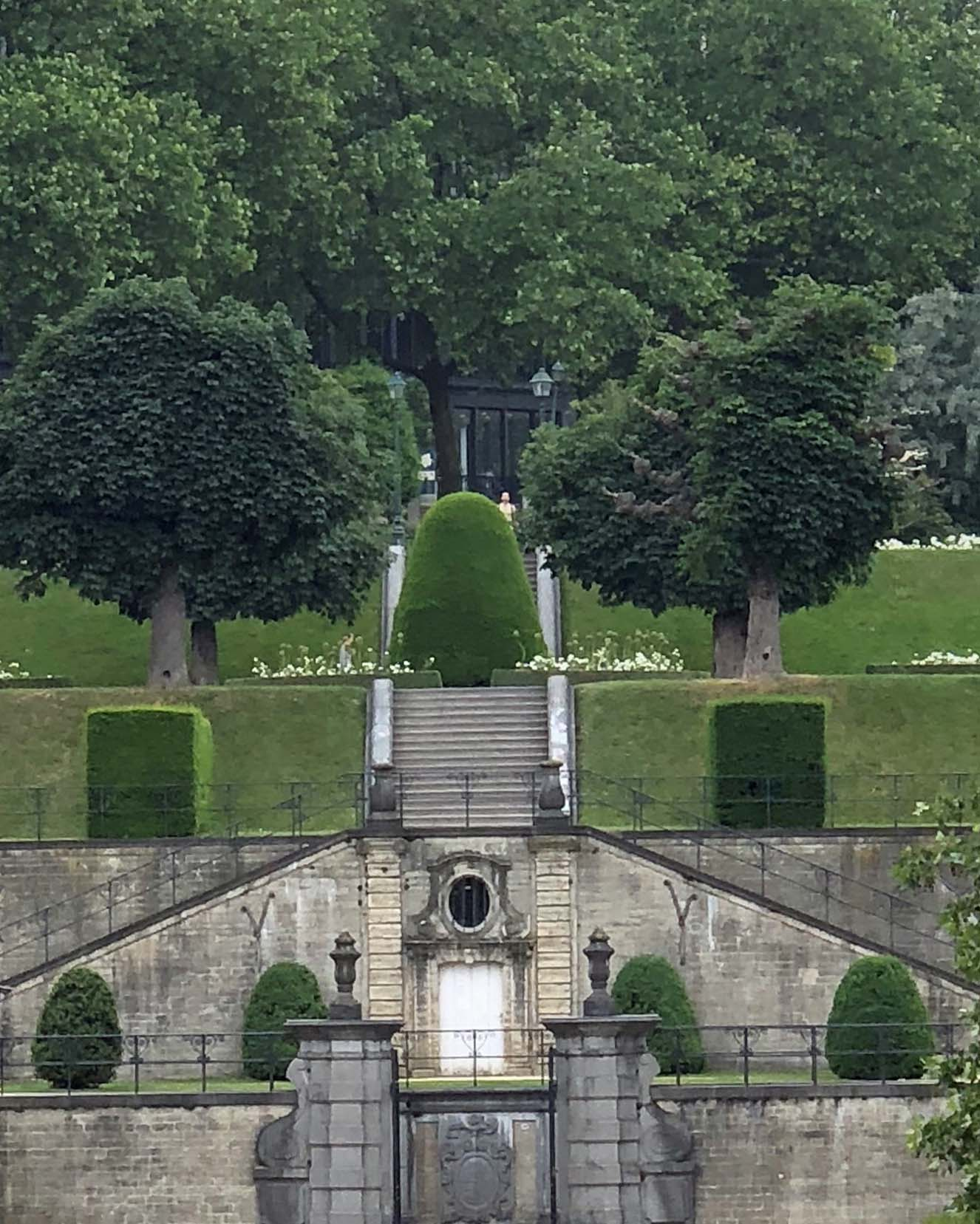 Escalier de l'abbaye de la Cambre